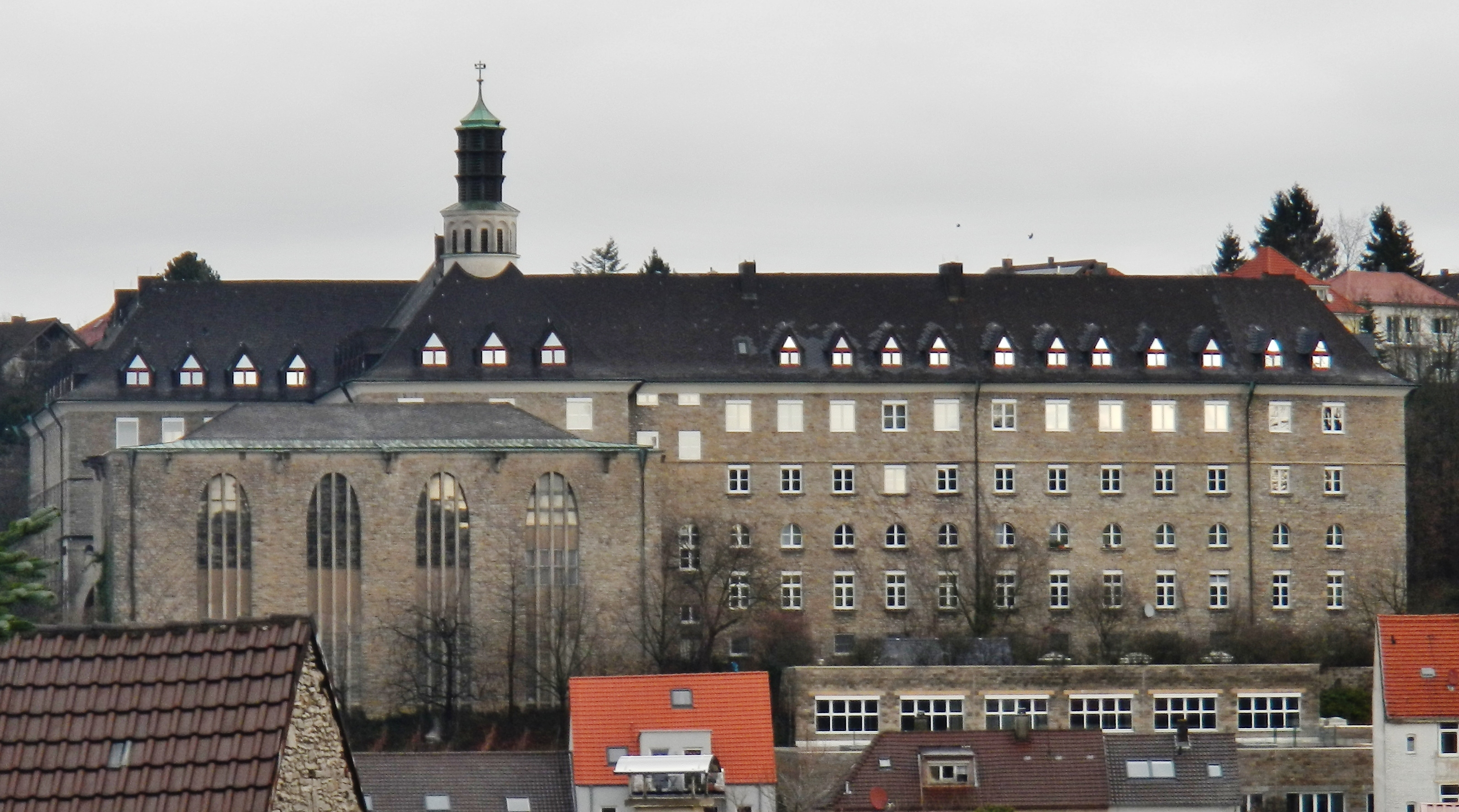 Privates Gymnasium St. Paulusheim